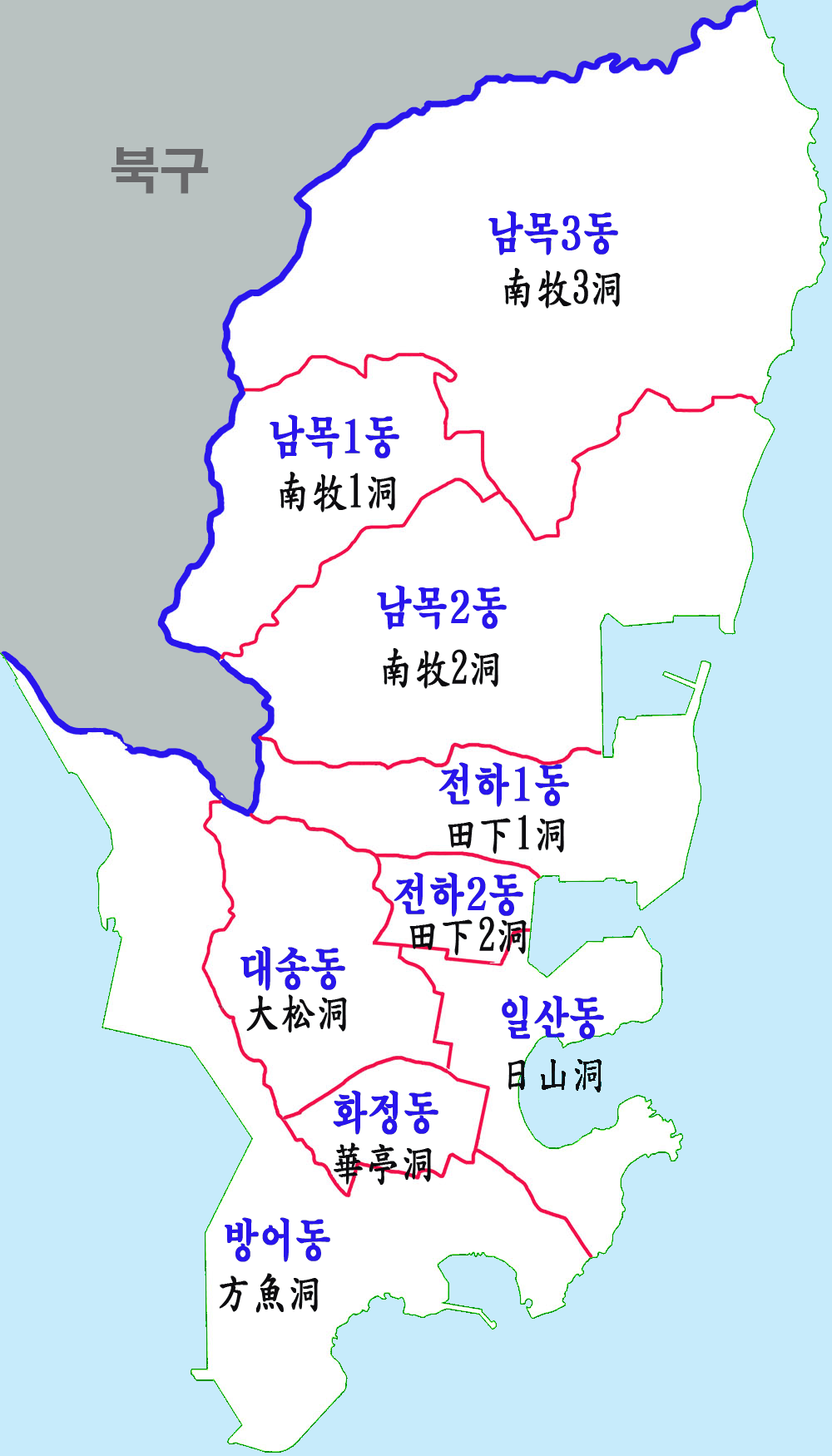 울산시 동구 행정구역도